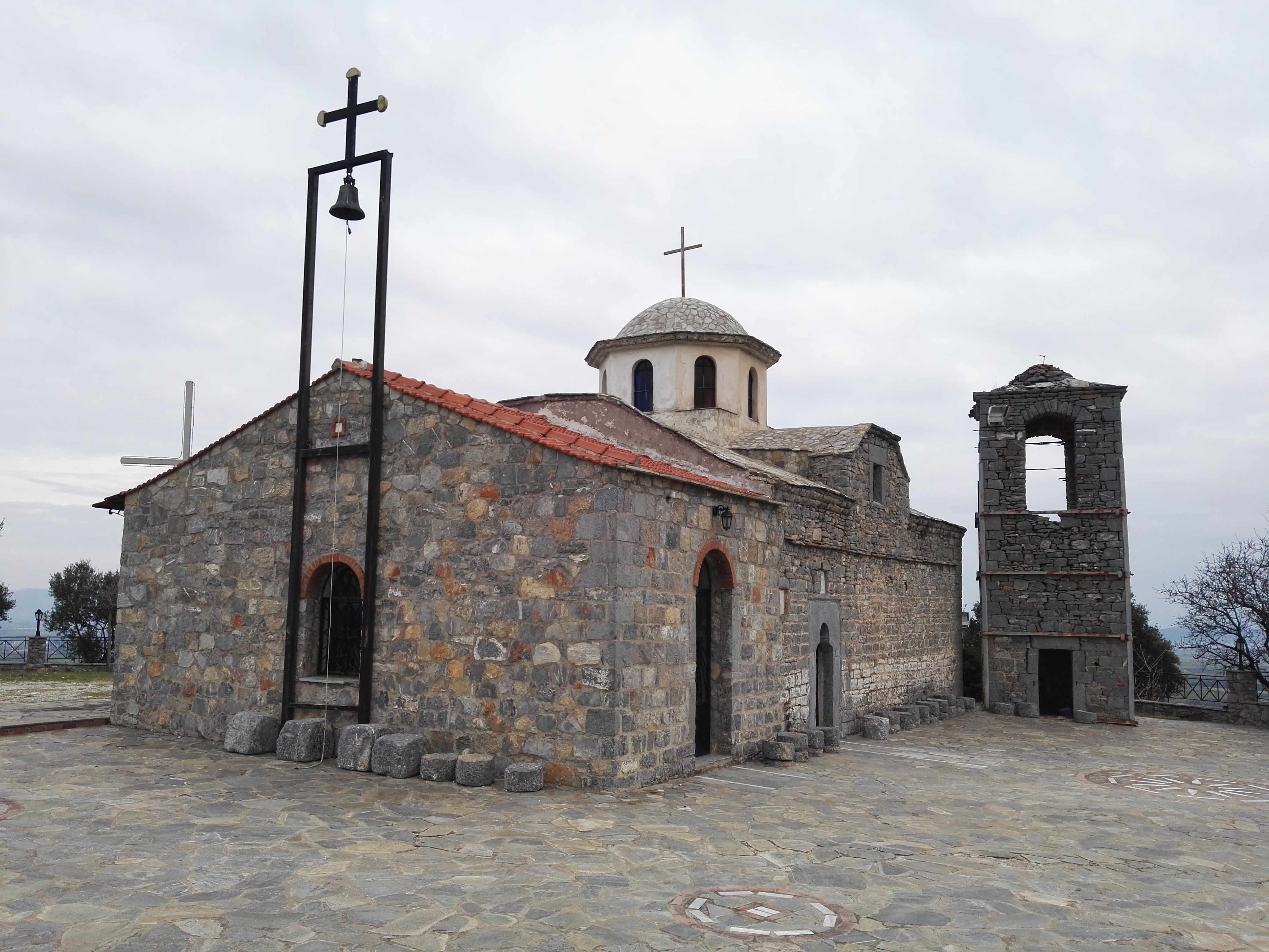 Ιερός Ναός Αγίου Αντωνίου στον Παλαιό Πλάτανο